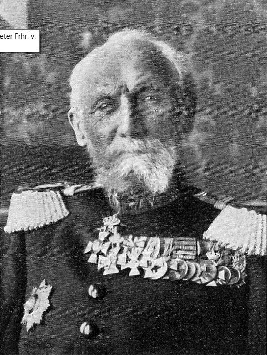 Oldenburgischer Kammerherr und Generalmajor Peter v. Gayl